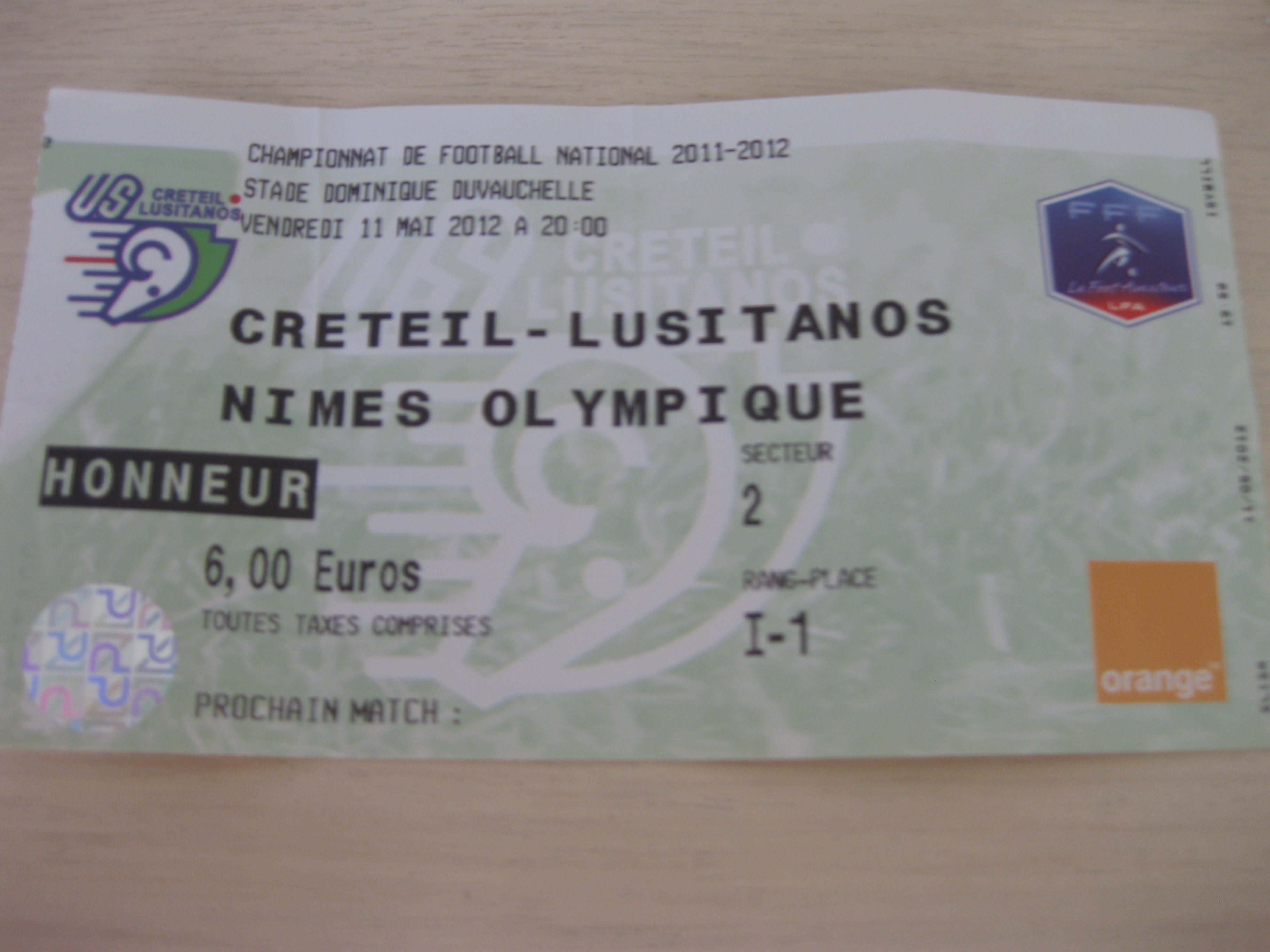 Bilete do jogo Créteil-Nimes do Campeonato National do 11 de Maio de 2012